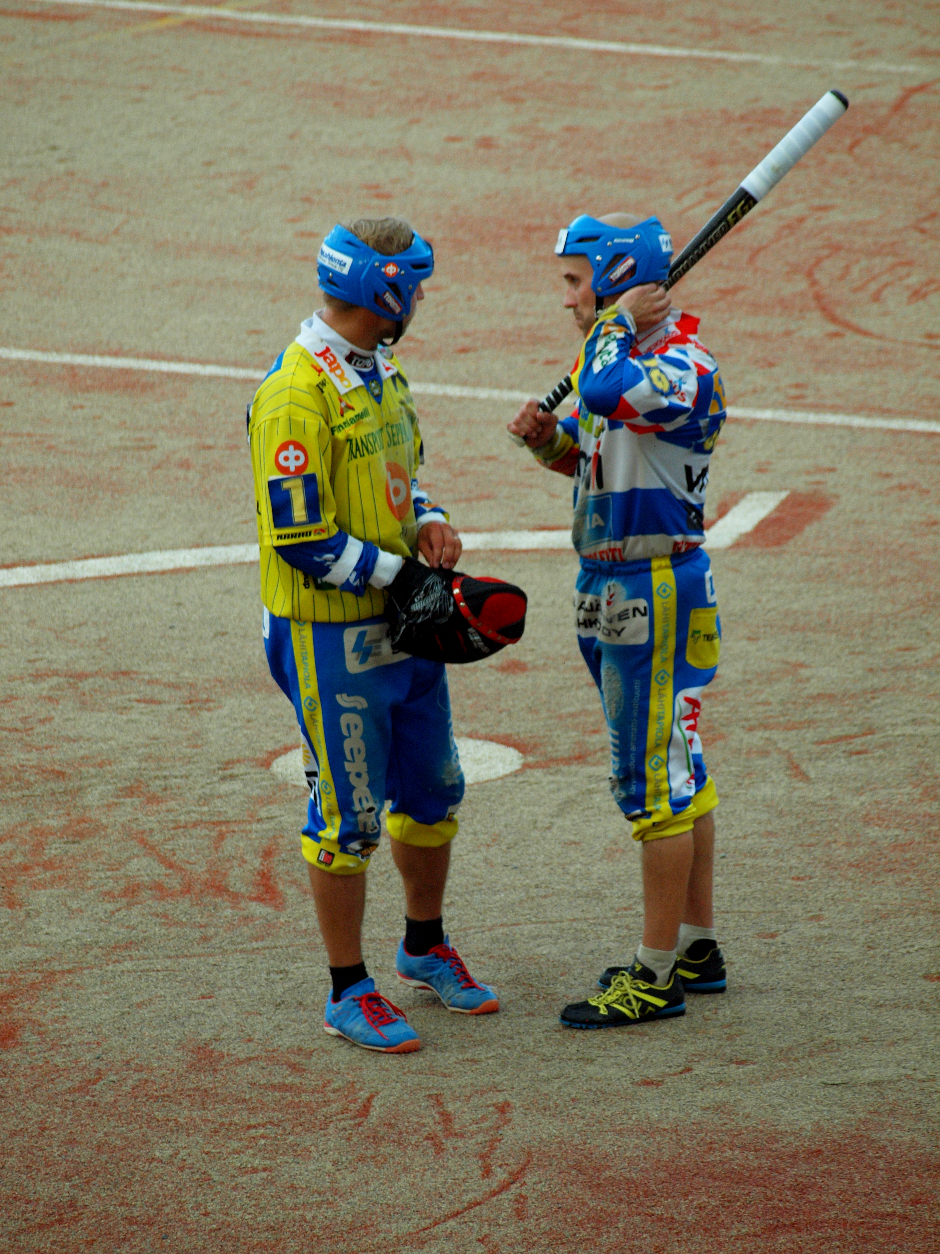 Alajärven Ankkurit - Vimpelin Veto pesäpallo-ottelu 10.8.2014. Kuvassa Aki Orava ja Juha-Matti Jaatinen.